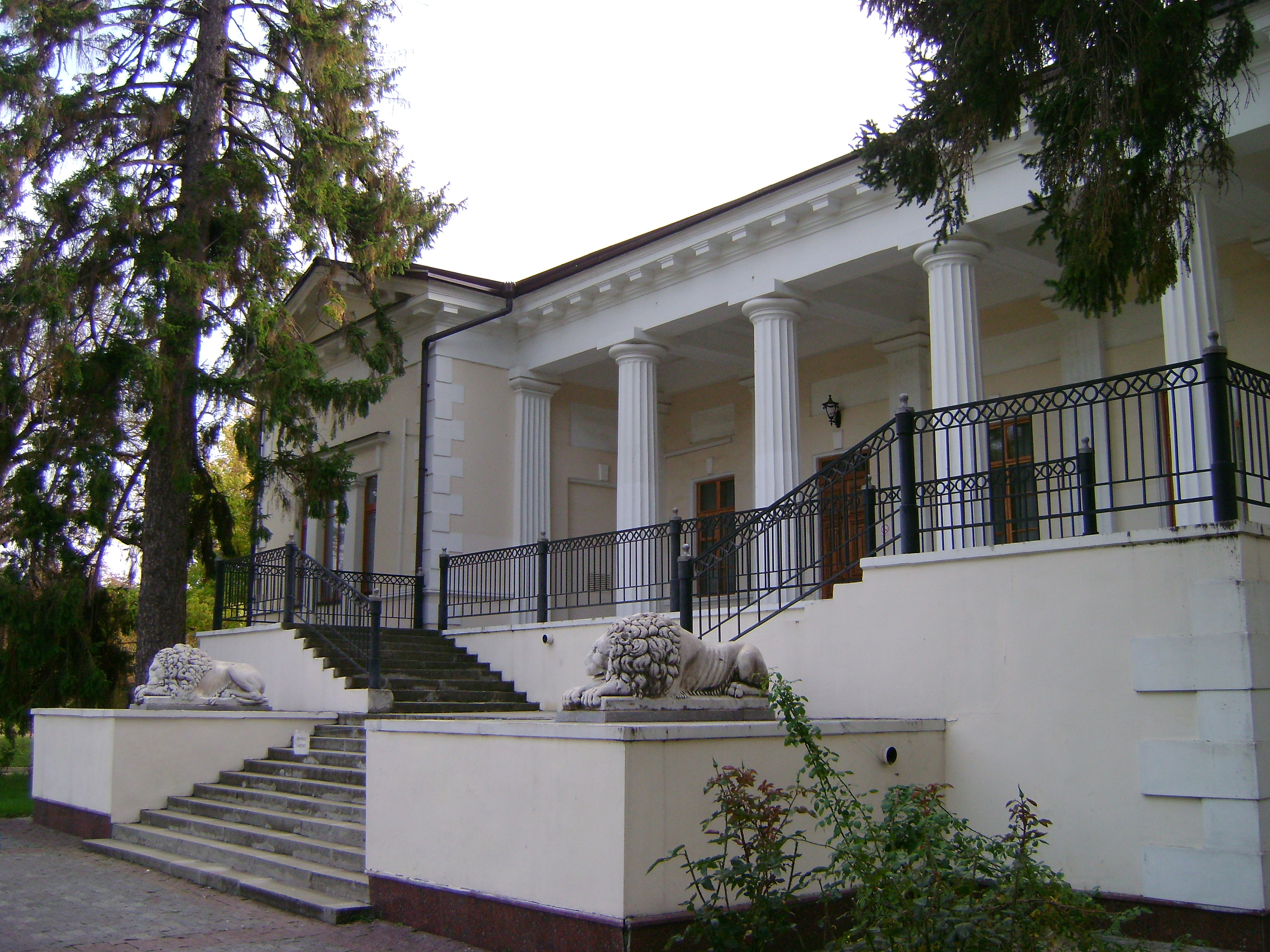 Комплекс заміського будинку М. С. Воронцова, Сімферополь, пр. Вернадського, 2; 1) літер «Б»; 2) літер «В», територія парку"Салгирка"